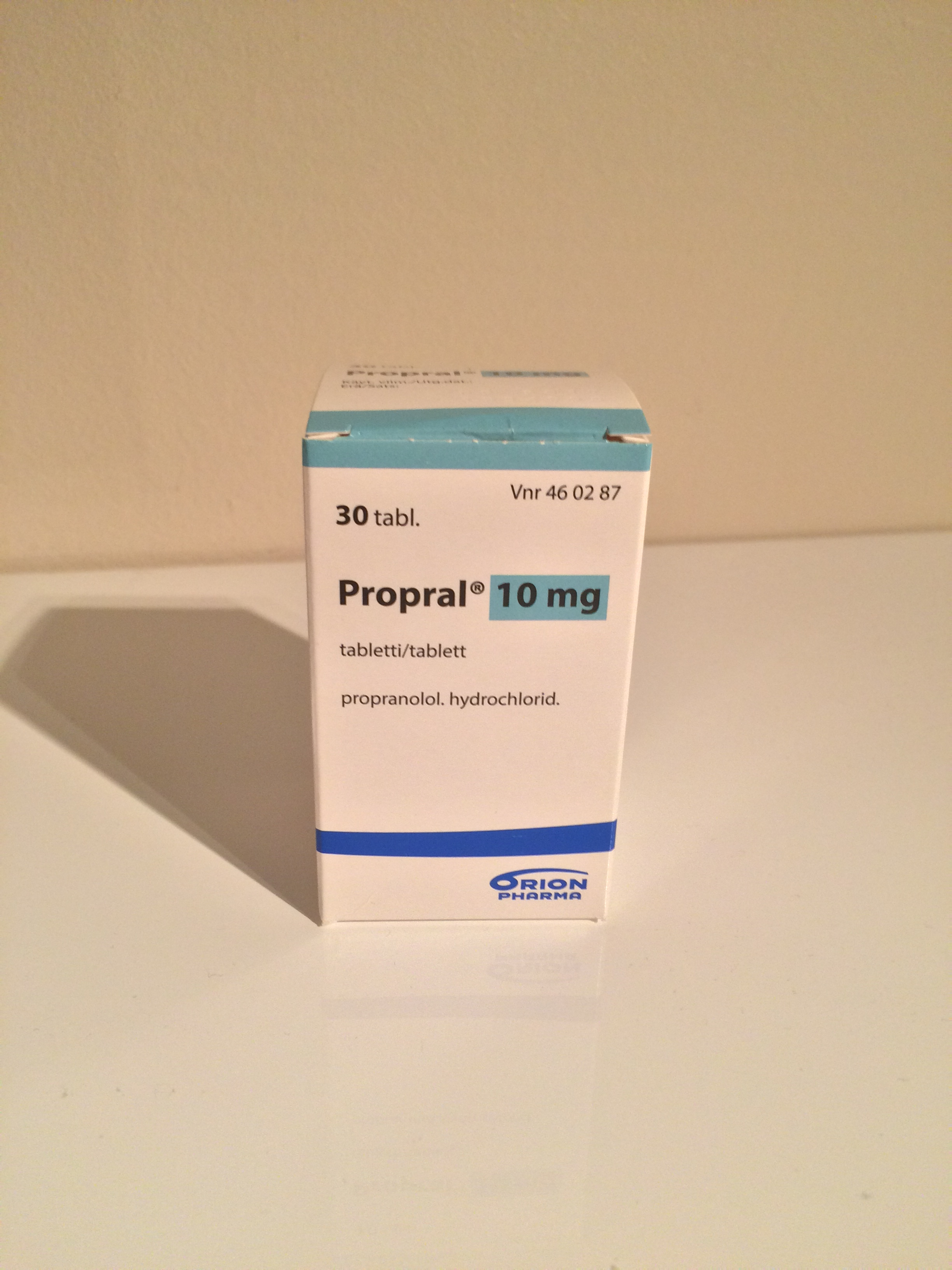 Propral-lääkepakkaus